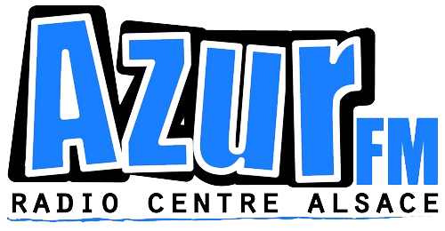 Le logo de la radio Azur FM date de 2011.